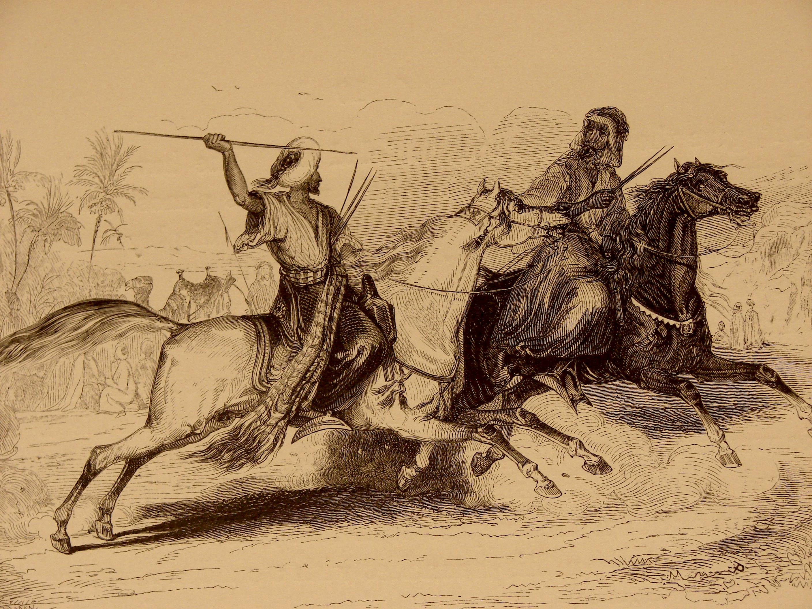 Mameluk against Arab rider fighting